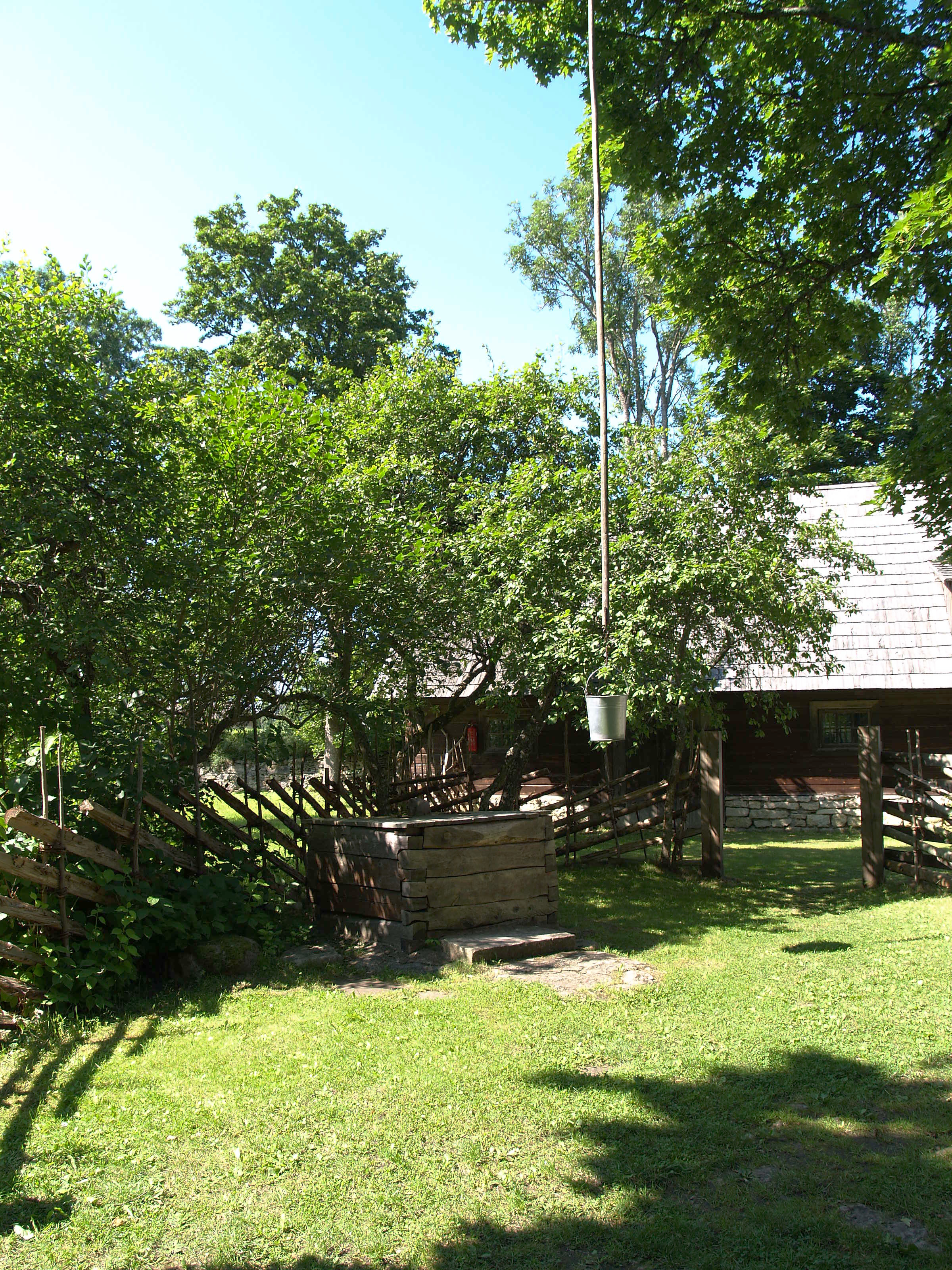 Mihkli talu kaev